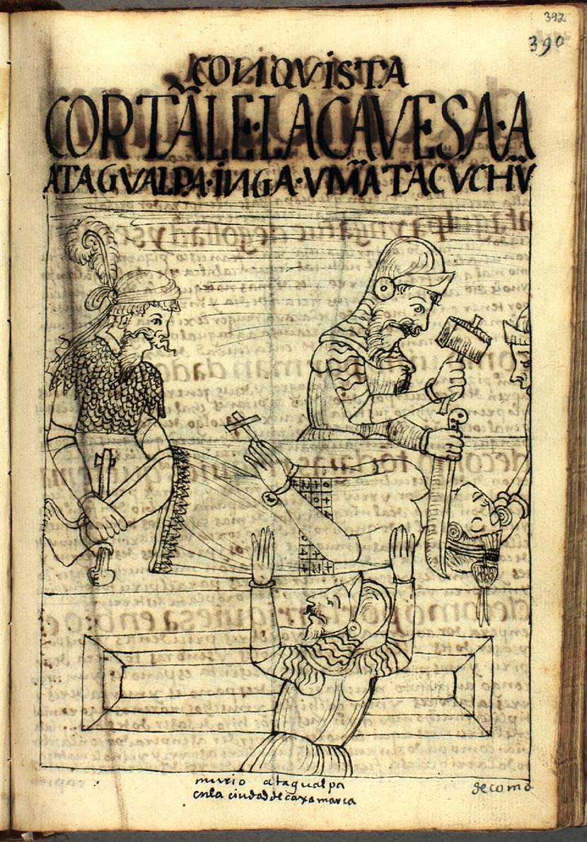 390 [392] CÓRTANLE LA CAVESA A ATAGVALPA INGA, VMANTA CVCHVN.